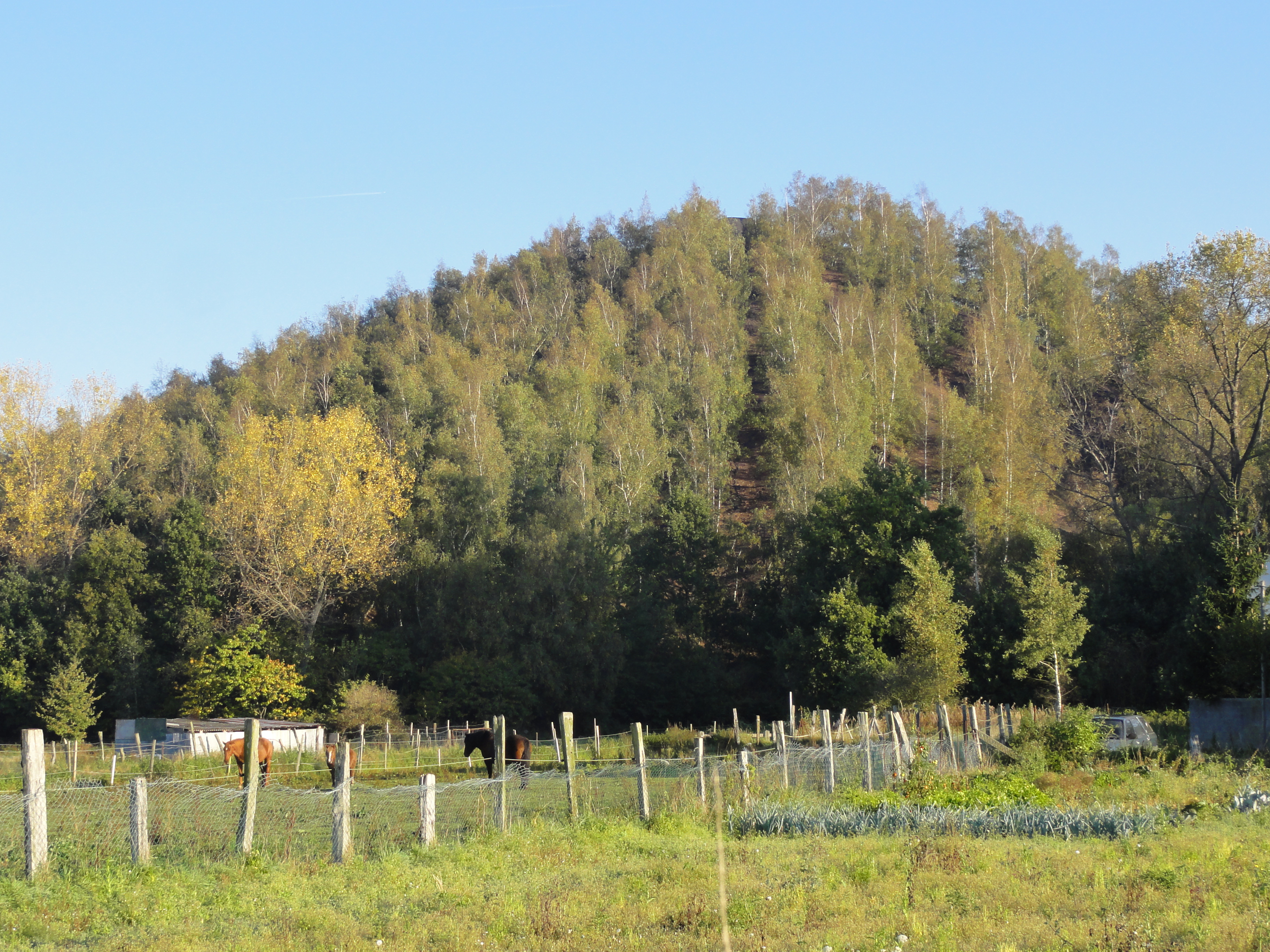 Terril n° 108 dit 7 d'Oignies, Fosse n° 7 - 7 bis de la Compagnie des mines d'Ostricourt, Ostricourt, Nord, Nord-Pas-de-Calais, France.